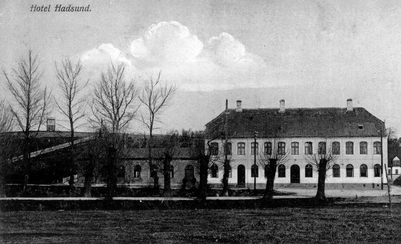 Hotel Hadsund set i 1892